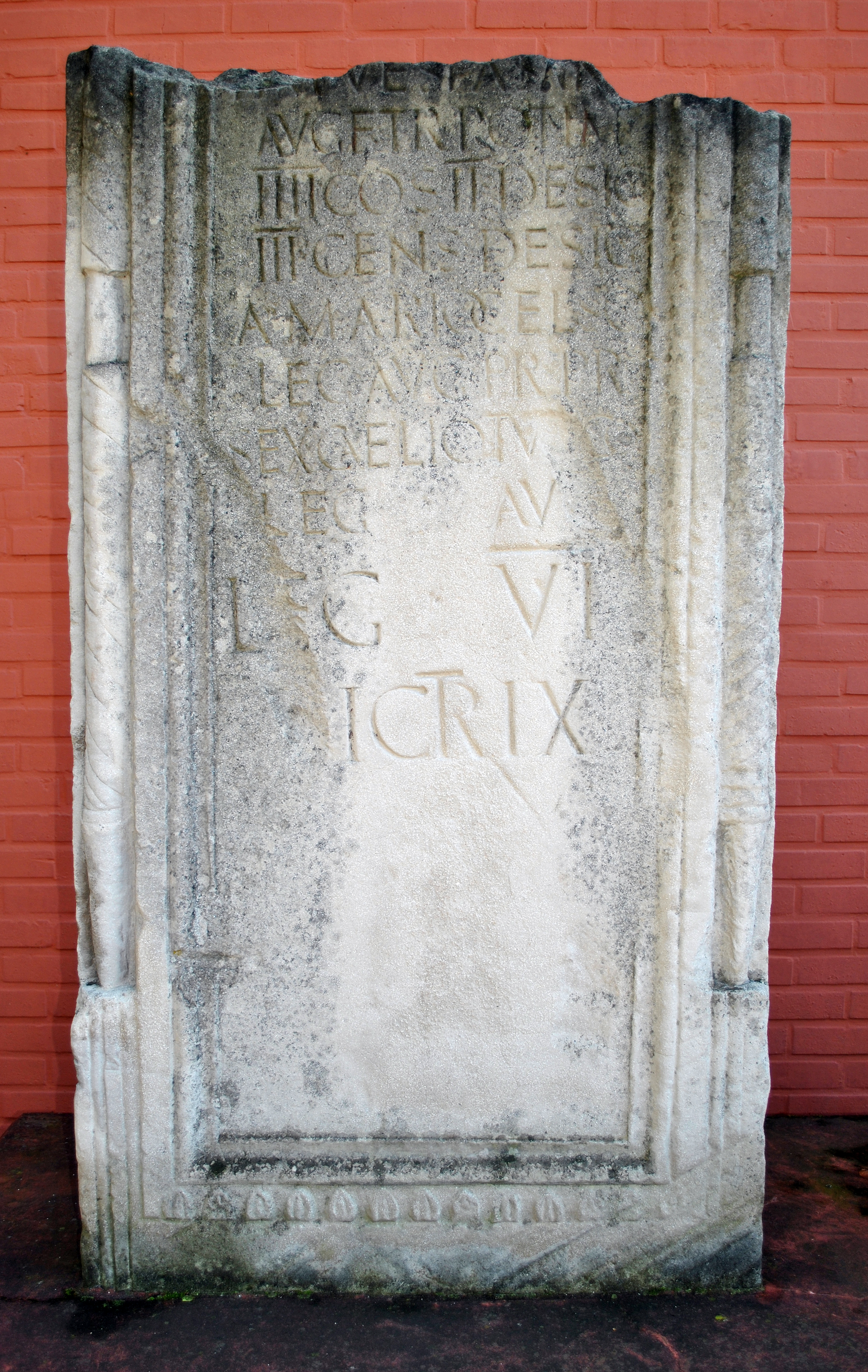 AE 1979, 00413 aus Vetera, Abguss im Archäologischen Park Xanten